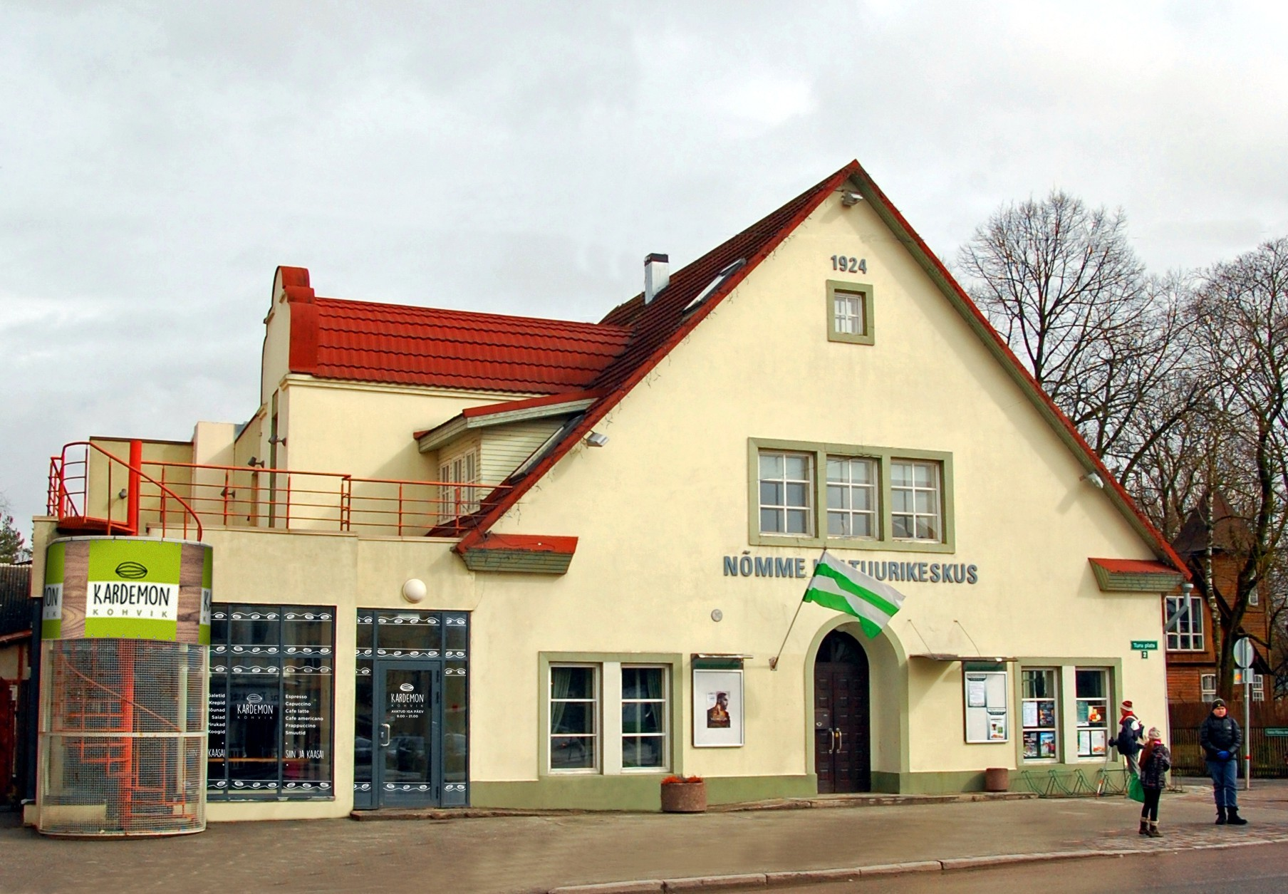 Nõmme Kultuurikeskus ja kohvik Kardemon, Turu plats 2